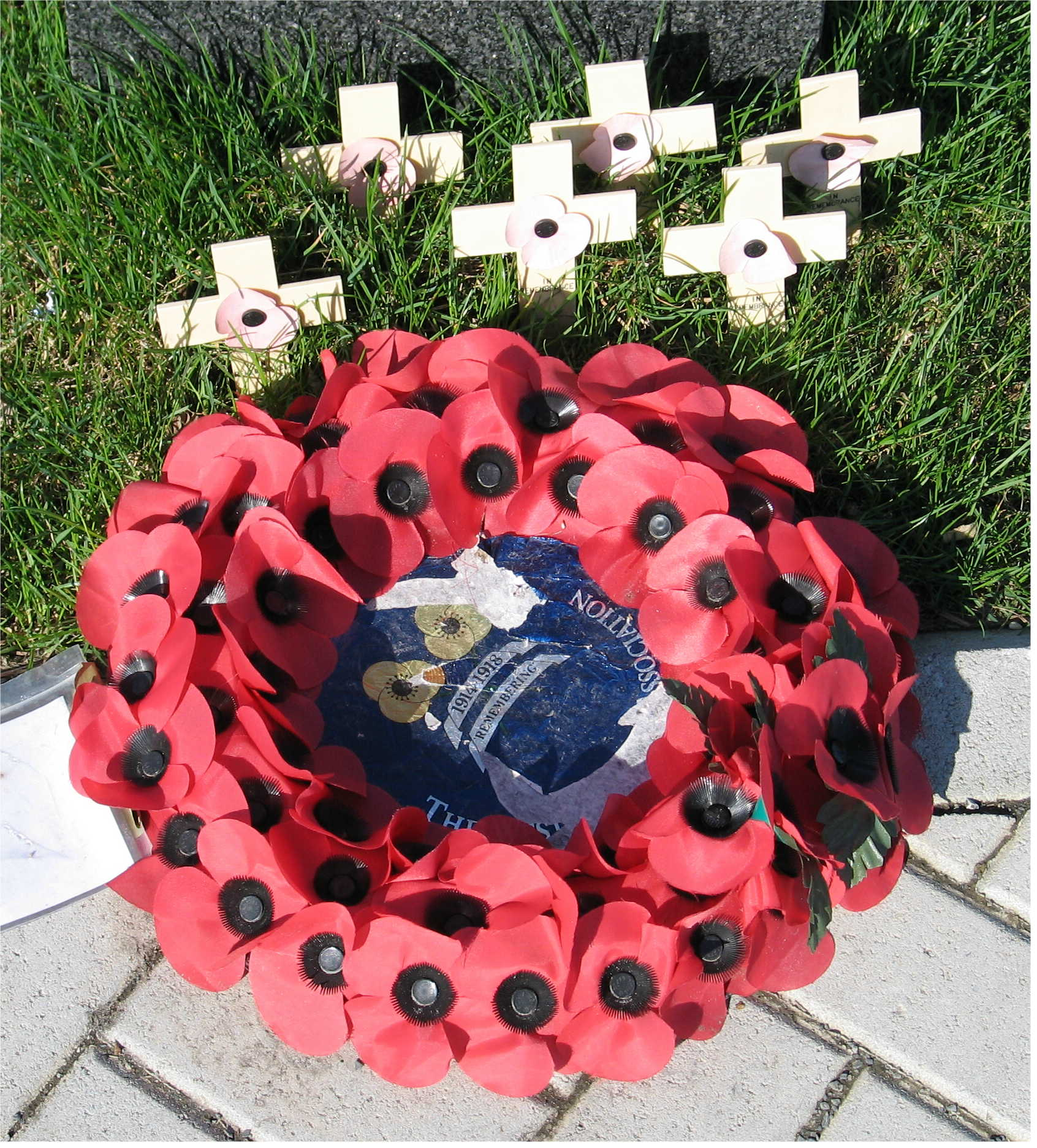 Blumme virum Lancaster Memorial zu Wäiswampech. Kategorie:Gemeng Wäiswampech